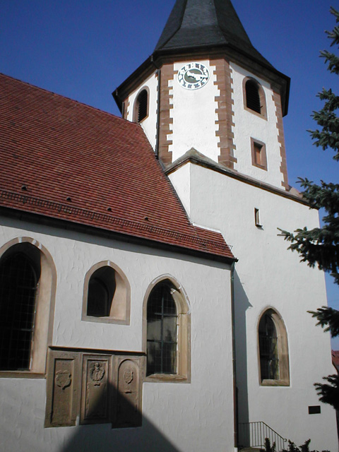 Evang. Kirche in Botenheim, Turm um 1280, Schiff um 1350